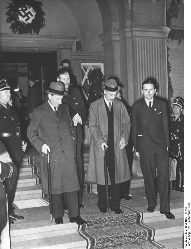 Scherl: Die Besprechung in Godesberg Der britische Botschafter Henderson und [Horace] Wilson der Berater des englischen Ministerpräsidenten verlassen am Abend des Freitag das Hotel Dreesen. Kurz darauf erschien Ministerpräsident Chamberlain zur Besprechung mit dem Führer. 23.9.1938